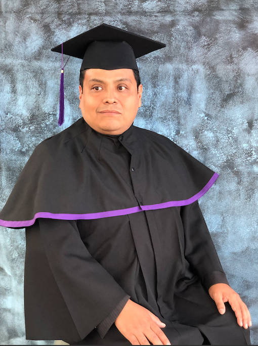 Graduado de maestría en Administración de Instituciones Educativas